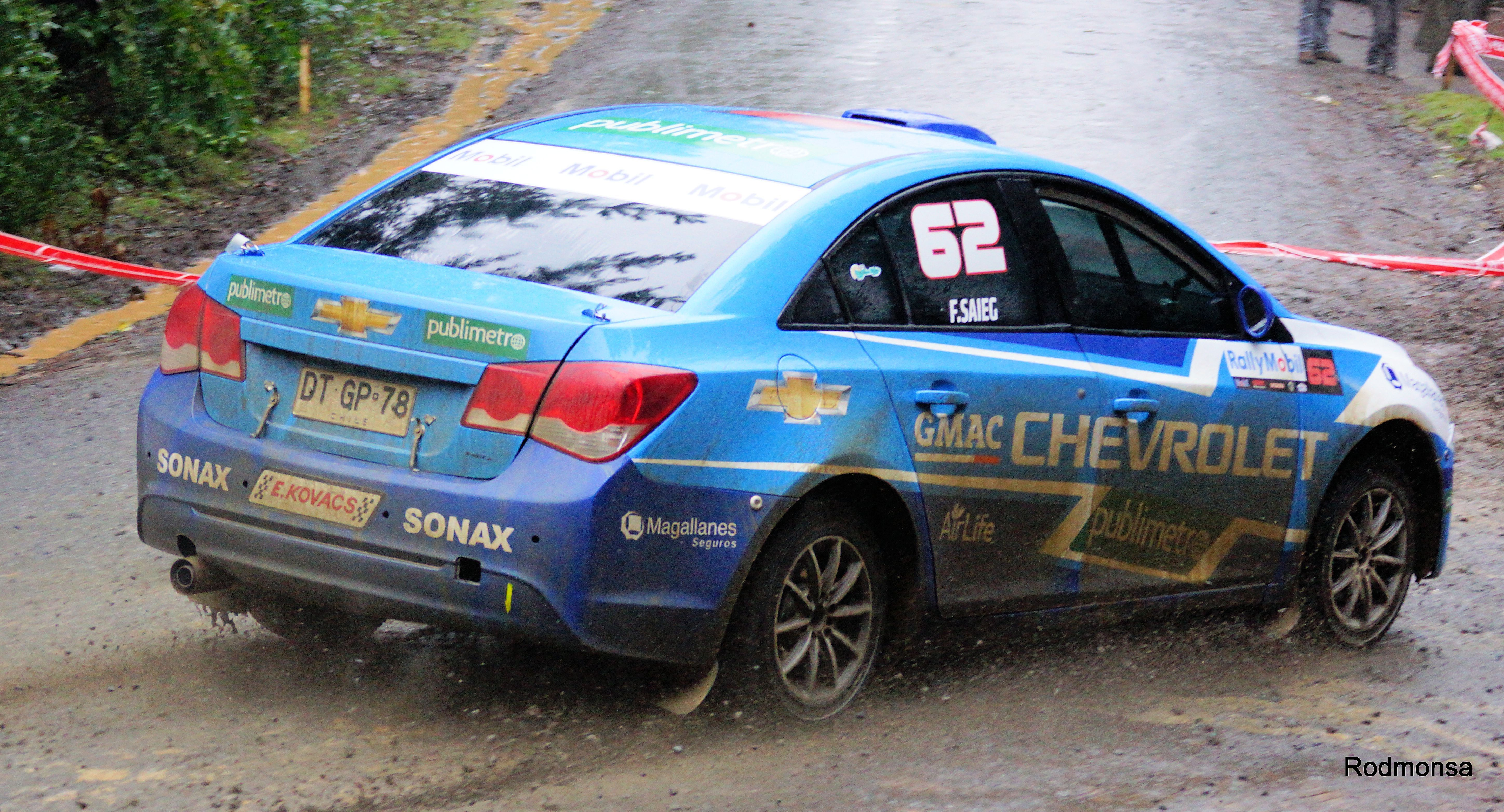 De Gavardo